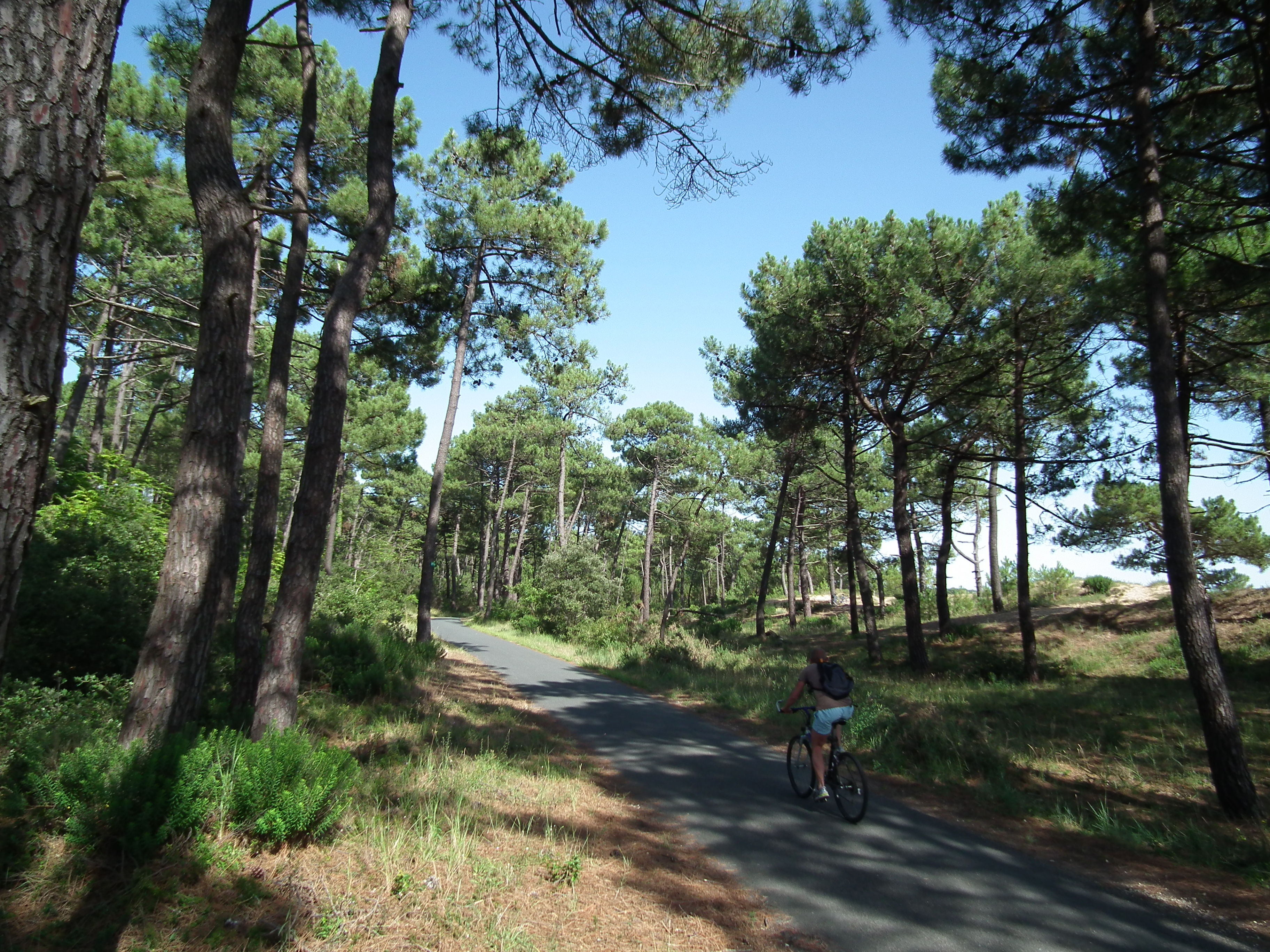 EuroVelo1 dans la forêt de la Coubre